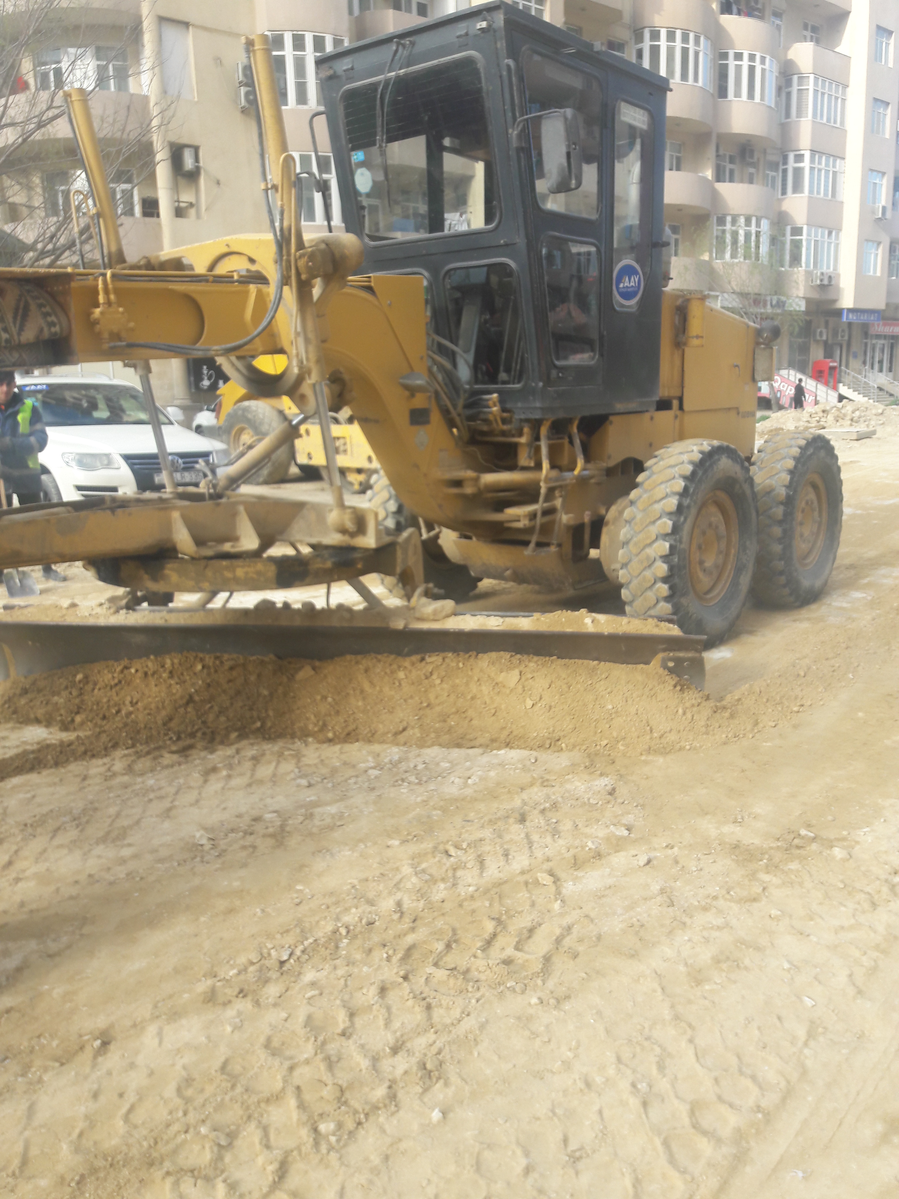 Ə.Əhmədov küçəsində təmir (16.04.2018)